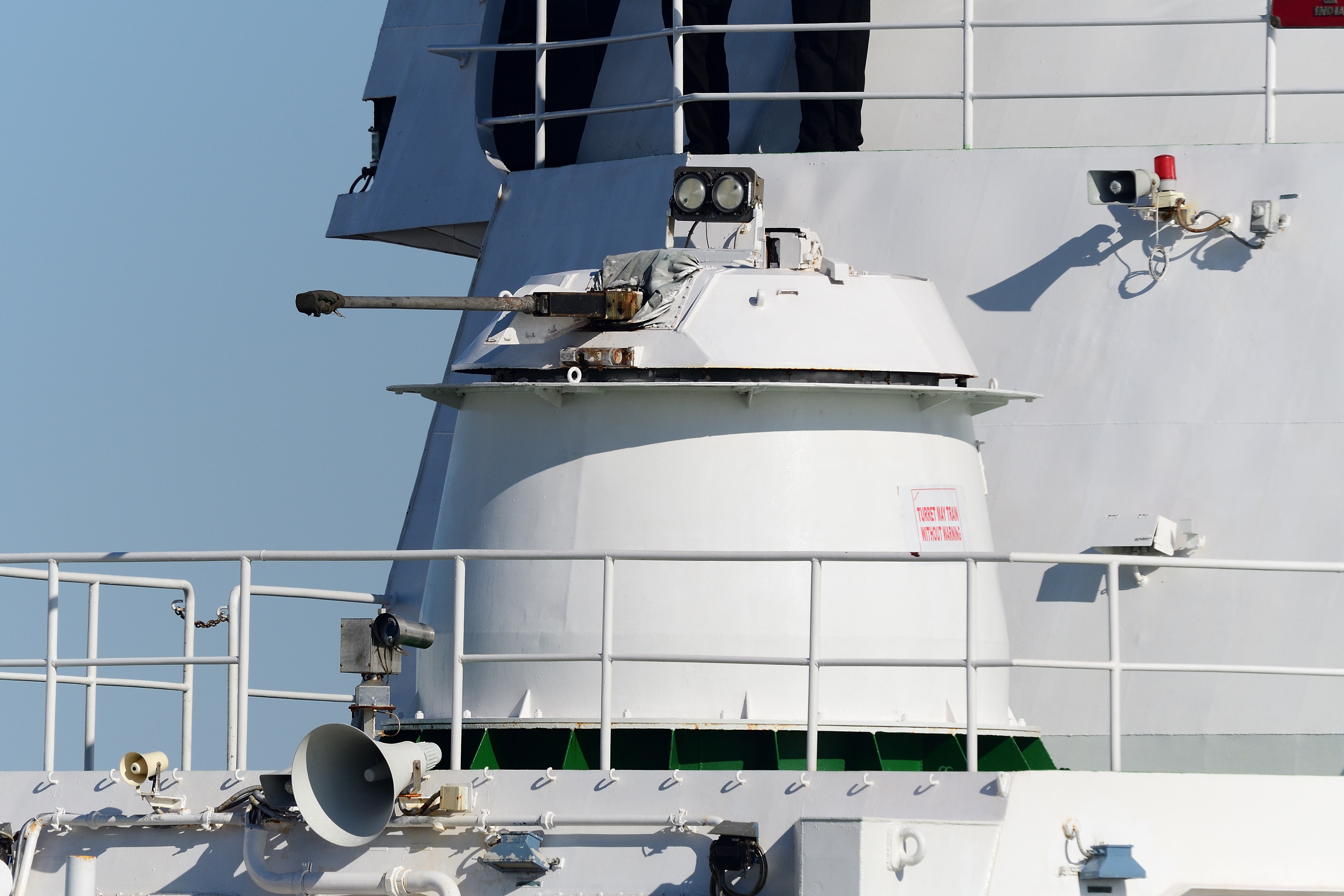 インド沿岸警備隊の巡視船「Shaunak」に搭載のCRN-91。横浜にて